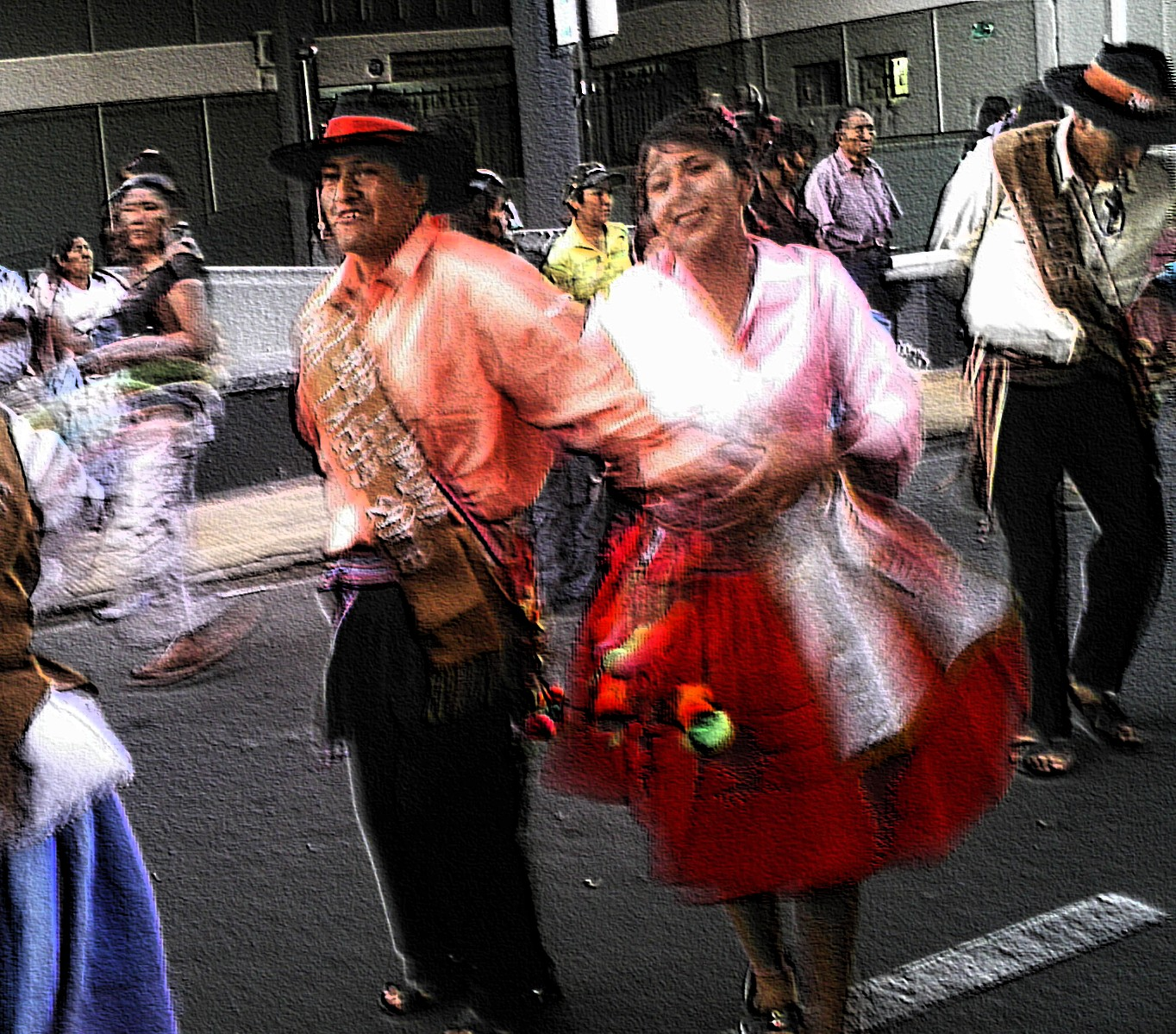 Carnaval Con la Fuerza del Sol Inti Chamampi 2008 Día 26 de Enero Arica-Chile